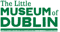 Logo du Little Museum of Dublin